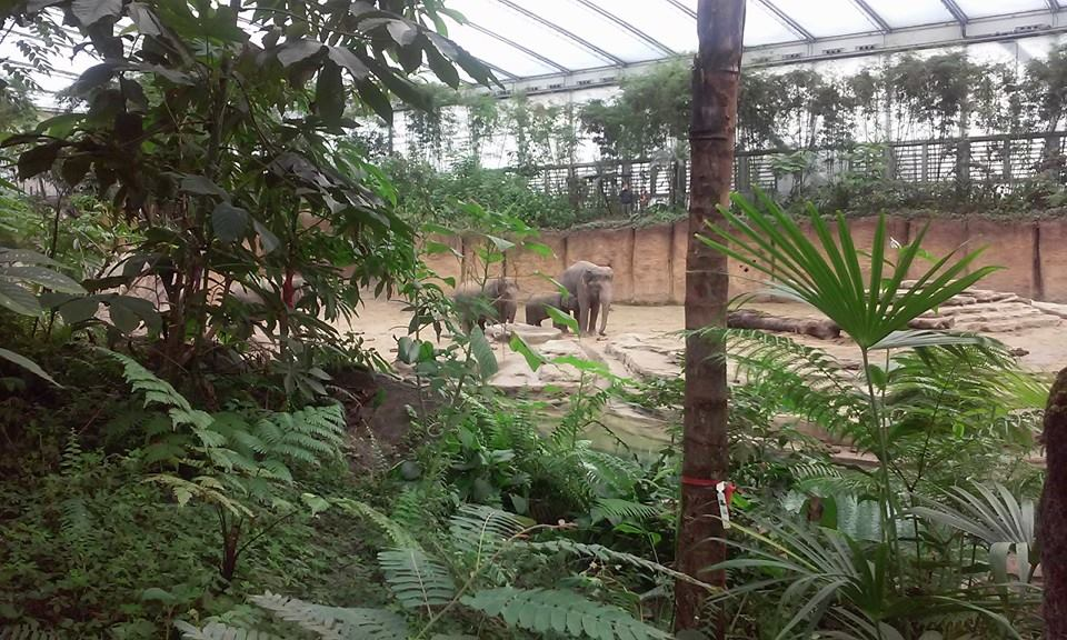 Olifantenvallei in WILDLANDS.